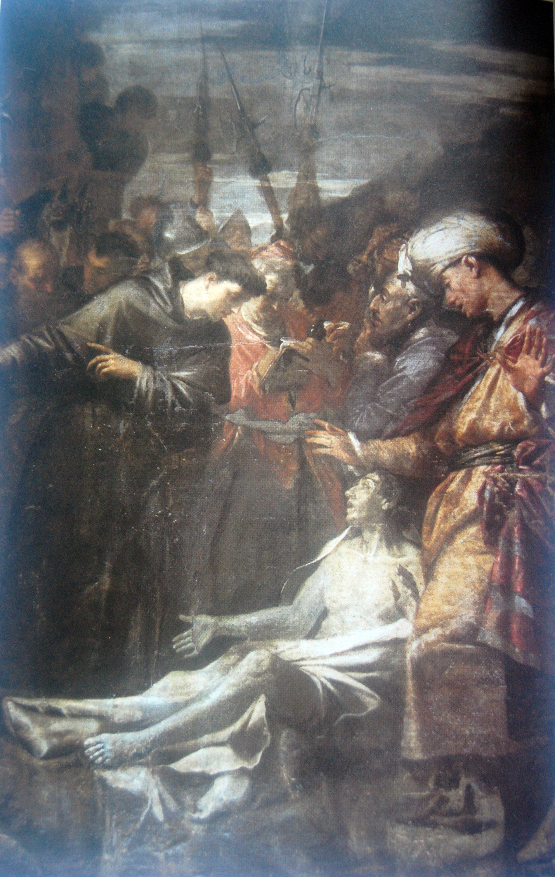 detail